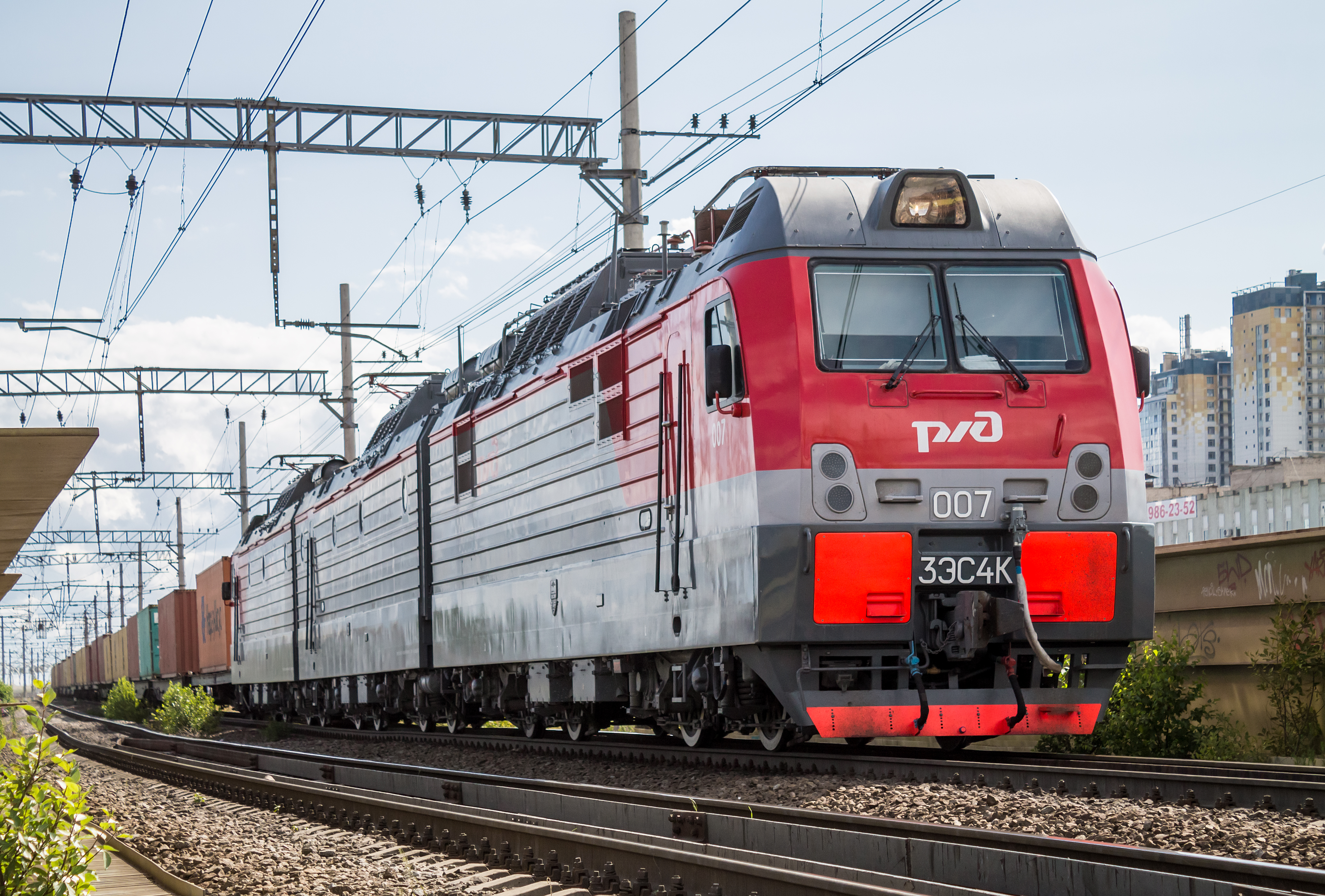 3ЭС4К-007, Предпортовая - Автово см. фото 696883 в альбоме автора